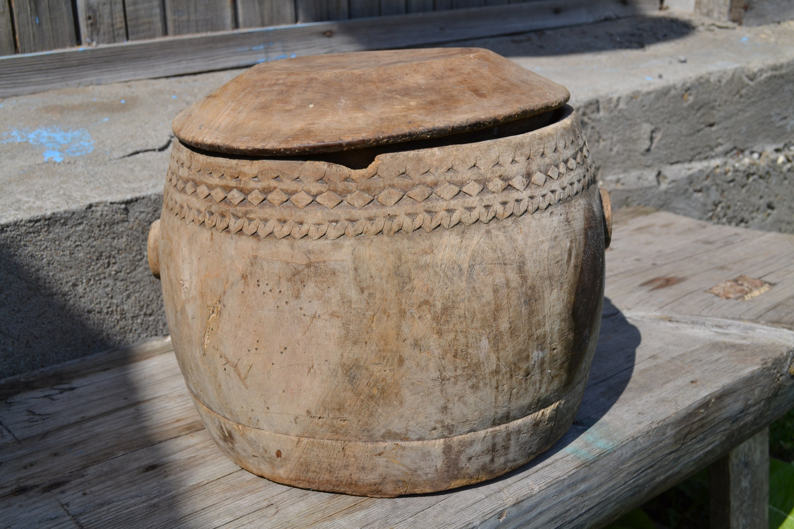 Башҡортса: Ағастан эшләнгән янтау